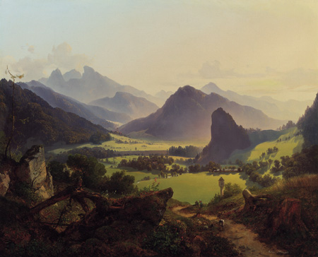 Blick ins steirische Landltaltitle QS:P1476,de:"Blick ins steirische Landltal" label QS:Lde,"Blick ins steirische Landltal"